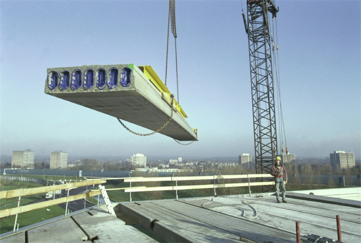 Spannbeton-Fertigdecken bestehen aus vorgefertigten Formteilen, die auf der Baustelle zusammengefügt werden. Dies ermöglicht rationelle und wirtschaftliche Bauabläufe.